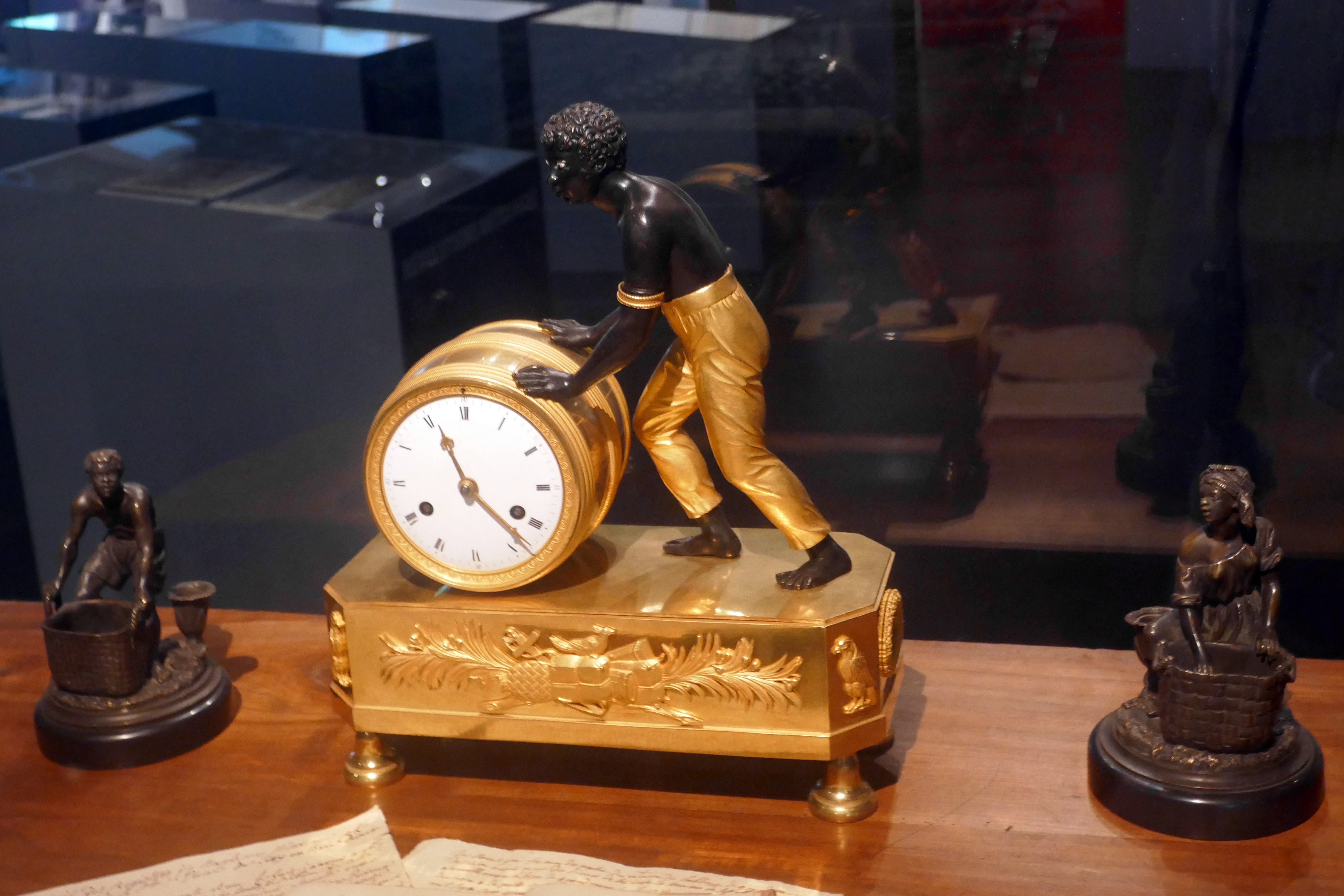 Horloge "au nègre" dite pousse tonneau. D'après Riche, époque Empire. Bronze patiné et doré, émail blanc. Don des Amis du musée d'Aquitaine. De part et d'autre de l'horloge, une paire de bougeoirs, Noirs au travail. Vers 1840, bronze. Musée d'Aquitaine, Bordeaux.